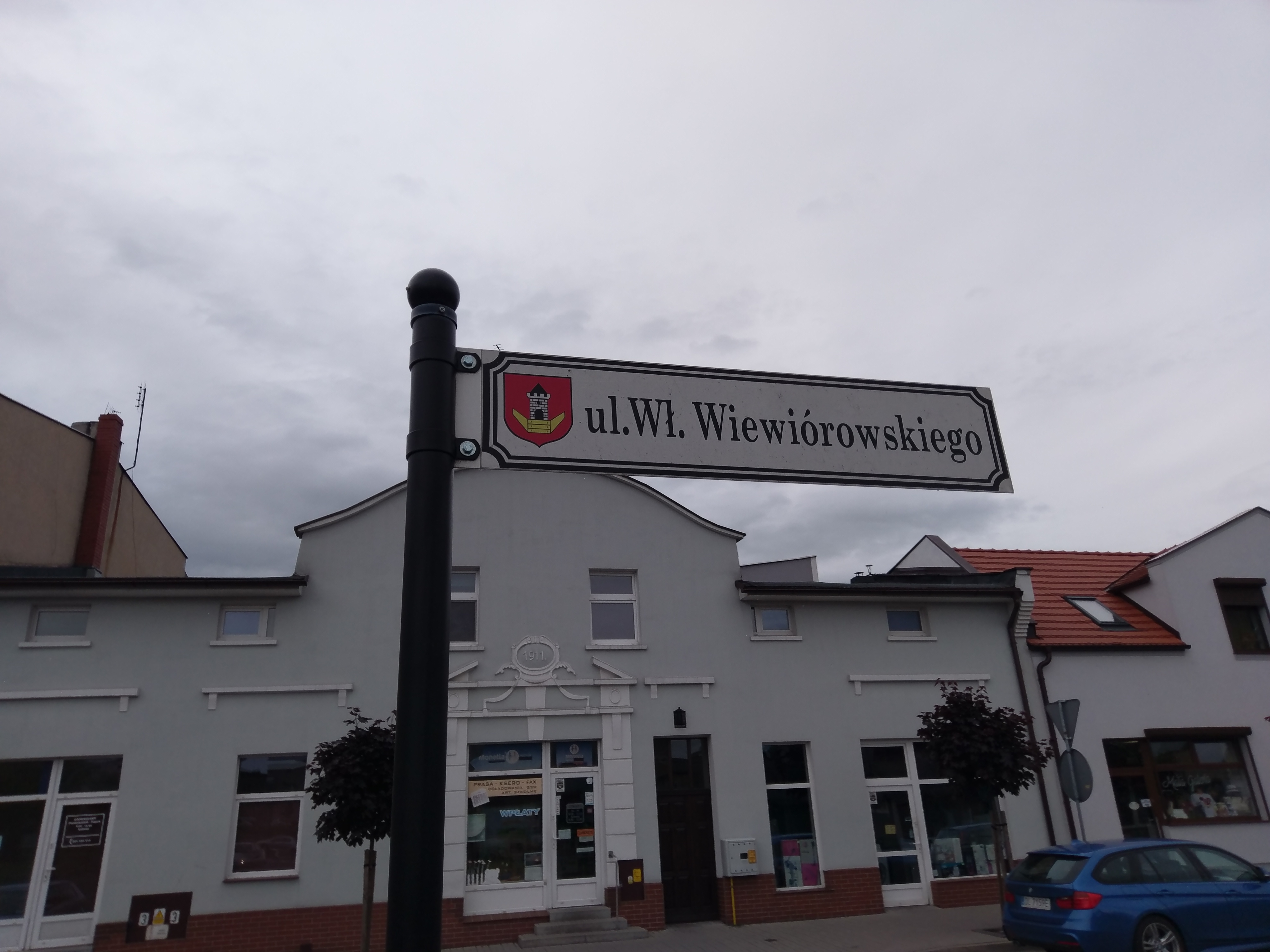 Tabliczka z nazwą ulicy, przy ul. Wiewiórowskiego w Miłosławiu